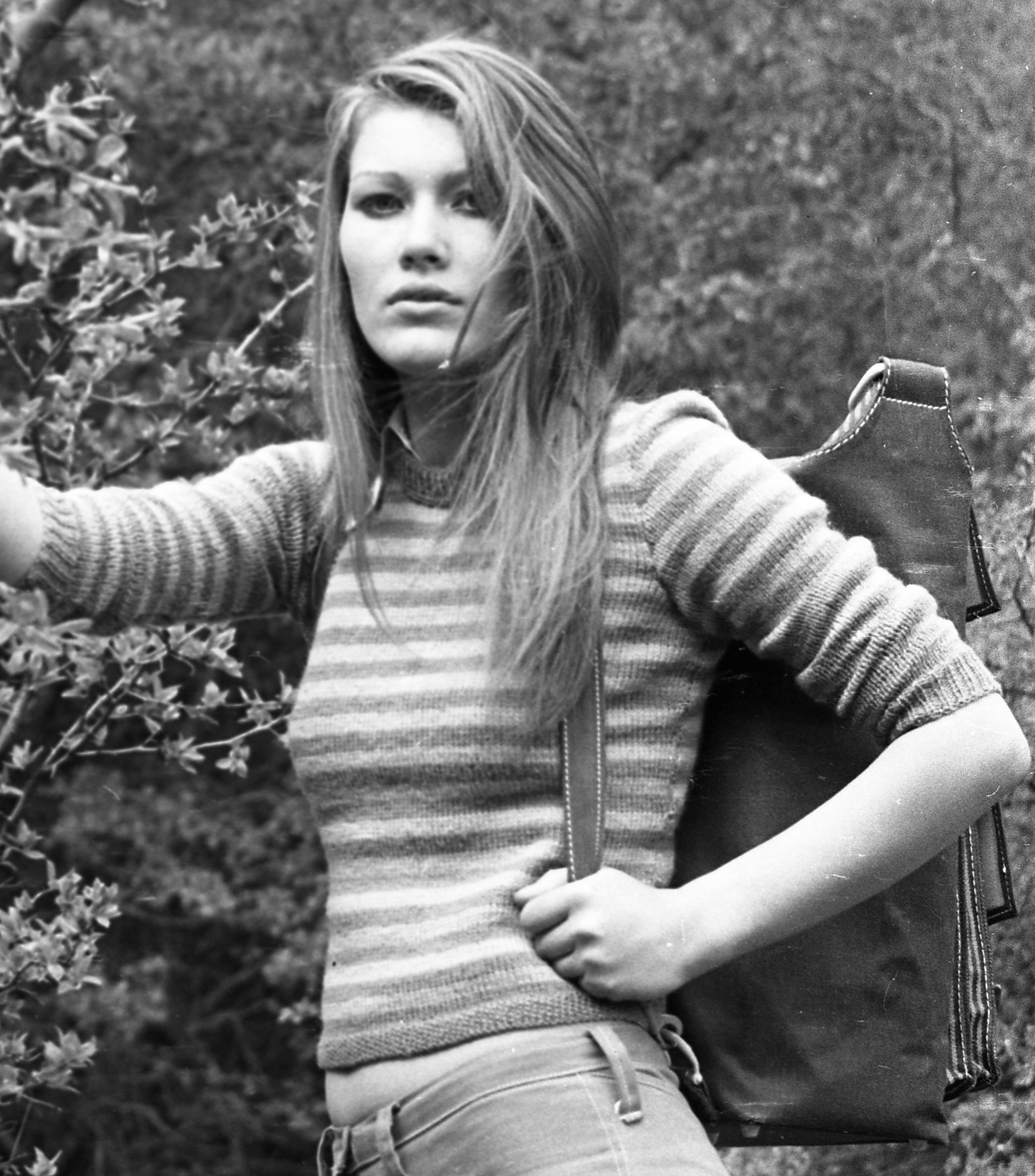 András Judit magyar manöken